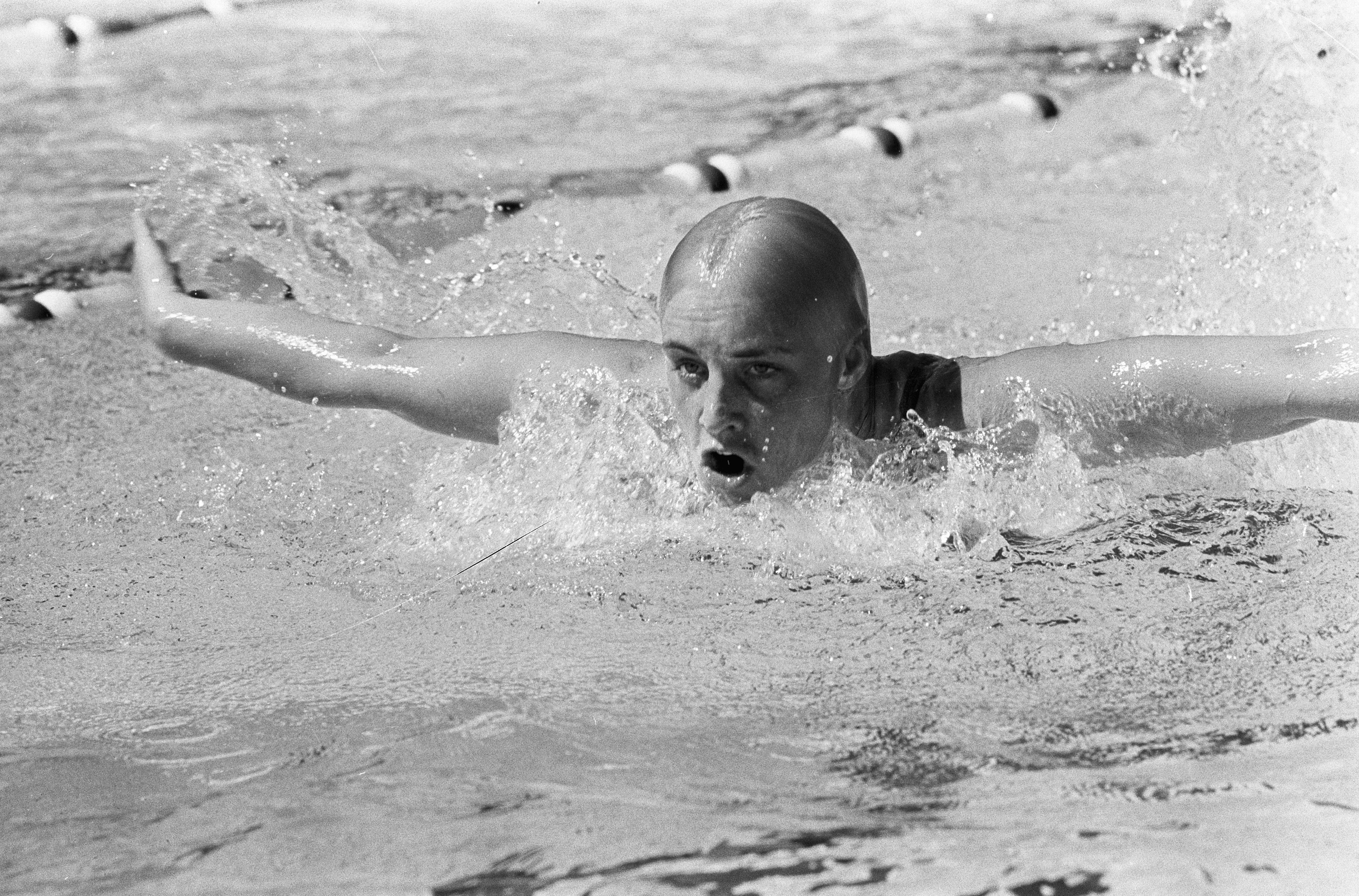 Collectie / Archief : Fotocollectie Anefo Reportage / Serie : [ onbekend ] Beschrijving : Europese Zwemkampioenschappen, Heike Hustede (W-Duitsland) in aktie Datum : 18 augustus 1966 Trefwoorden : kampioenschappen, zwemmen Persoonsnaam : Hustede, Heike Fotograaf : Kroon, Ron / Anefo Auteursrechthebbende : Nationaal Archief Materiaalsoort : Negatief (zwart/wit) Nummer archiefinventaris : bekijk toegang 2.24.01.05 Bestanddeelnummer : 919-4607